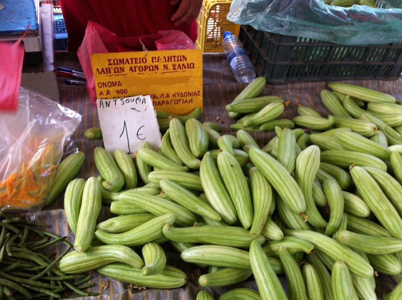 Αντζούρι